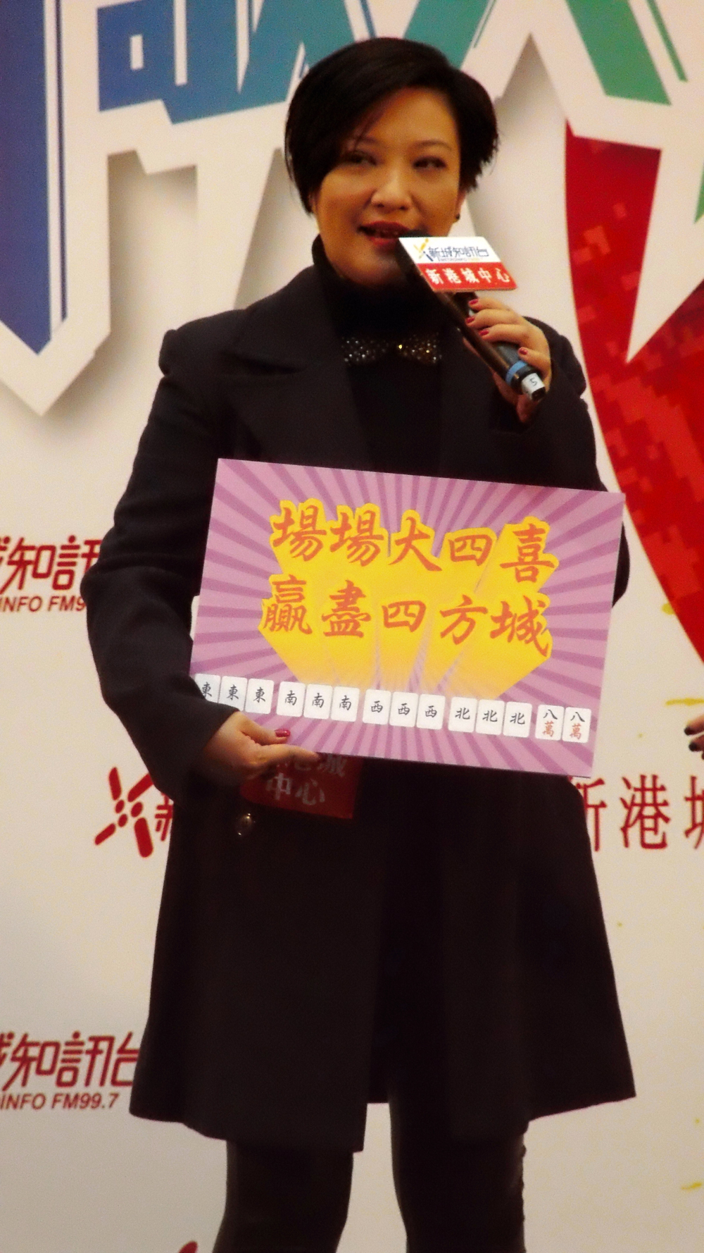 劉雅麗的樣子